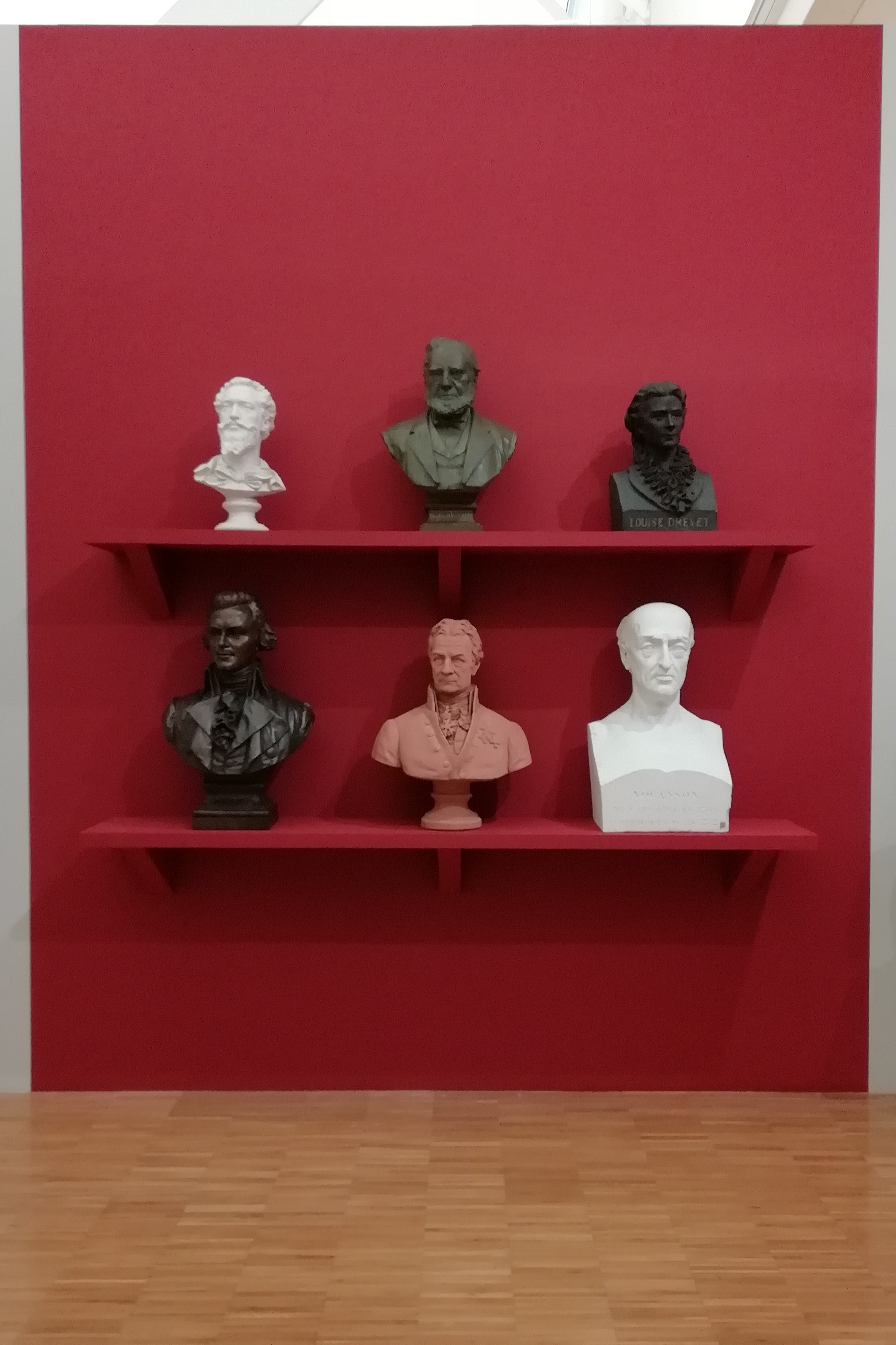 Galerie de portraits dauphinois, créée au sein de la Bibliothèque municipale de Grenoble, reproduite en partie durant l'exposition temporaire "Grenoble et ses artistes au XIXe siècle" au Musée de Grenoble.